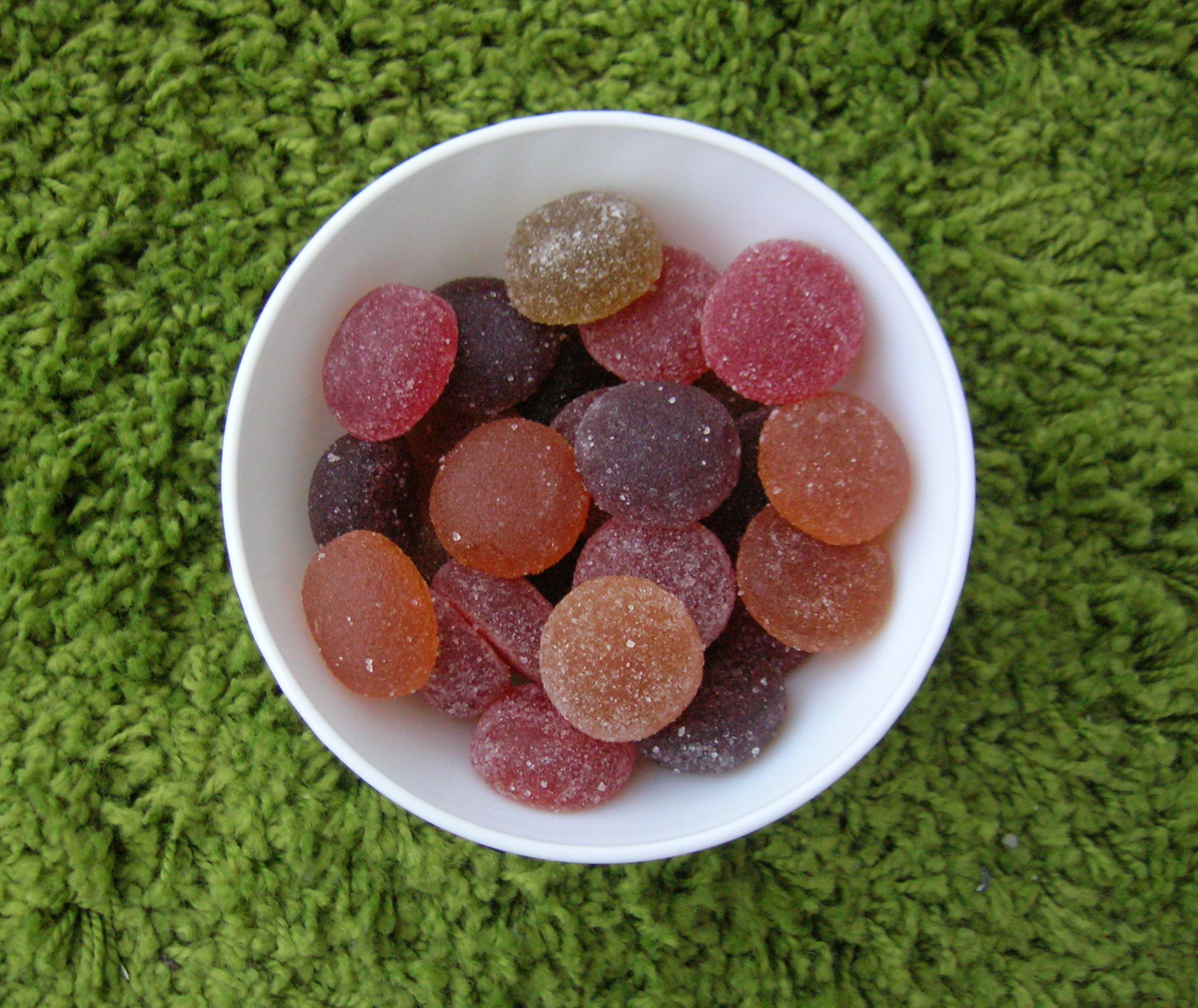 Pâtes de fruits d'Auvergne, fabriques à Saulcet, France.